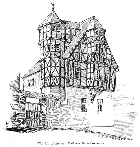 Haus Staffel zu Beginn des 20. Jahrhunderts